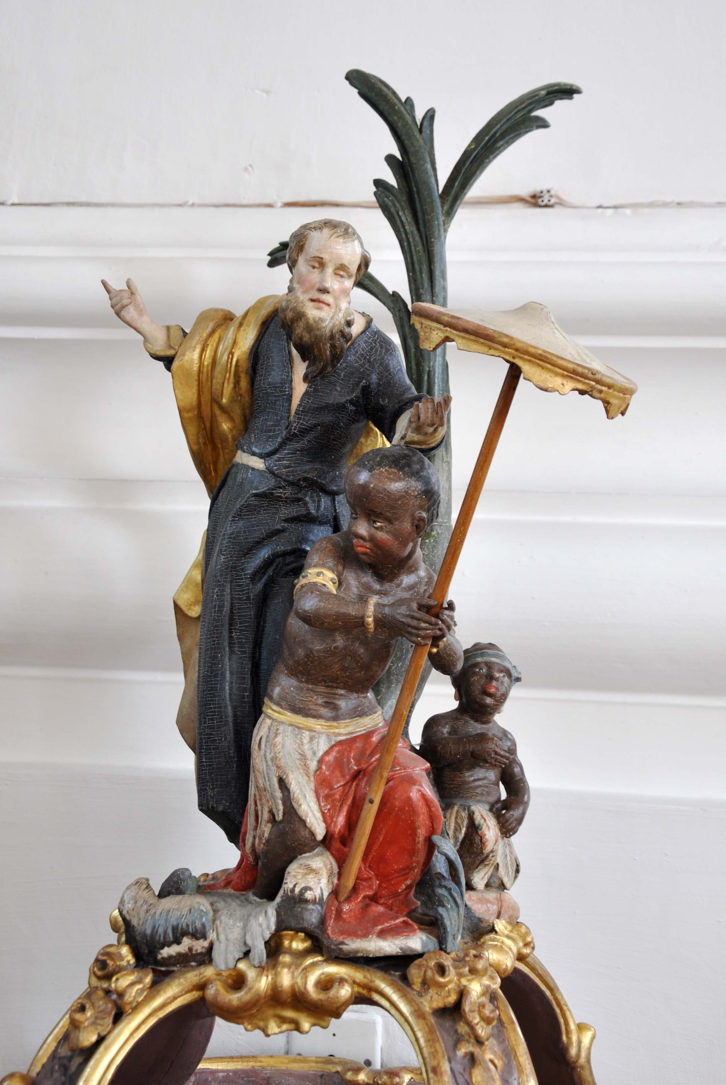 Katholische Pfarrkirche St. Martin, Unteressendorf, Gemeinde Hochdorf (Riß) Taufstein mit Aufsatz „Philippus tauft den Kämmerer von Äthiopien“ (laut ausliegendem Führer der Kirchengemeinde), alternativ „Franz Xaver tauft einen Mohren“ (lt. der älteren Literatur)